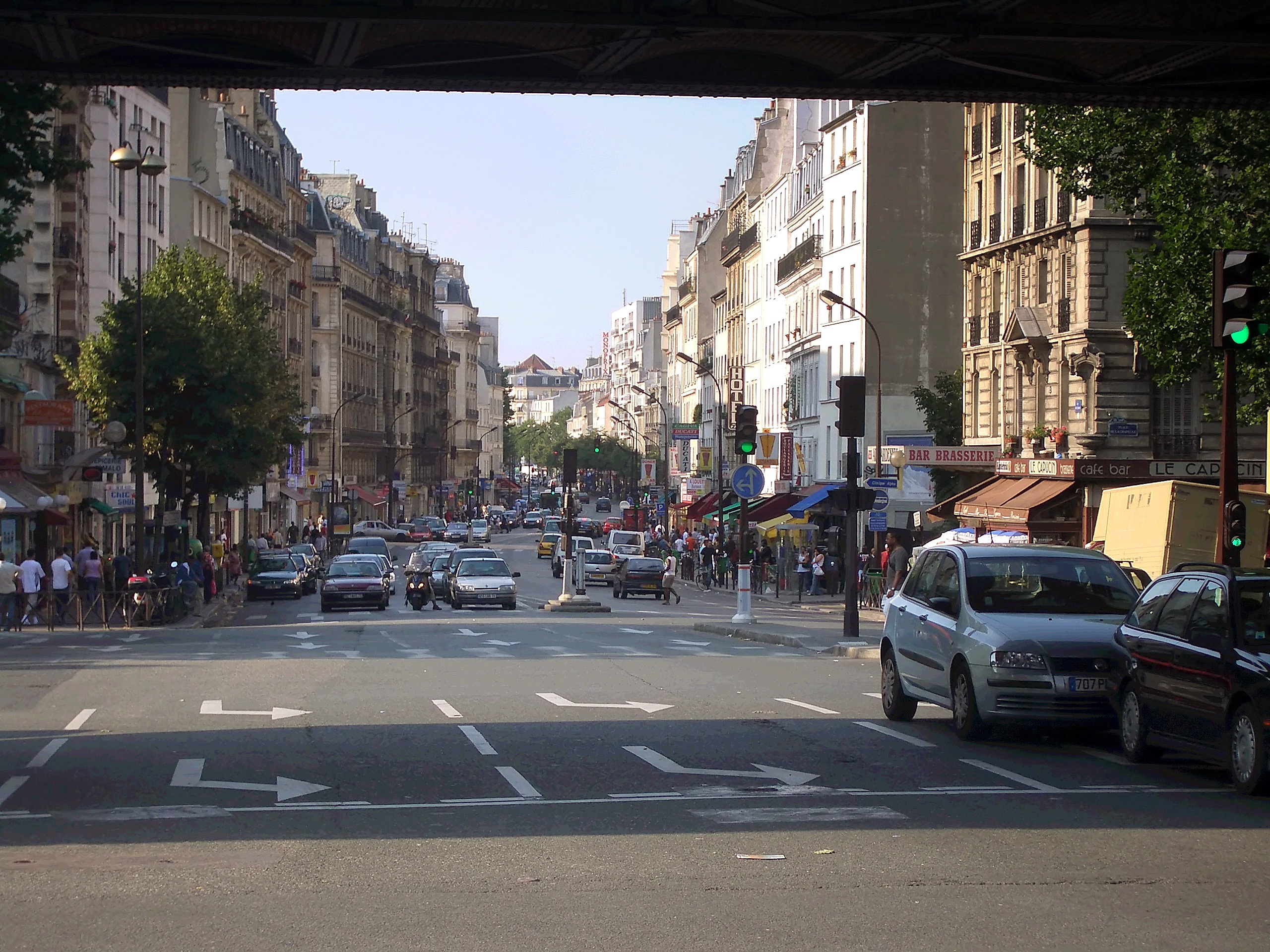 Vue de la rue marx dormoy dans le Quartier de La Chapelle (XVIIIè), regardant vers le nord. Prise le 14 juillet 2006 ; modifiée dans Picasa pour regler le contraste, etc.